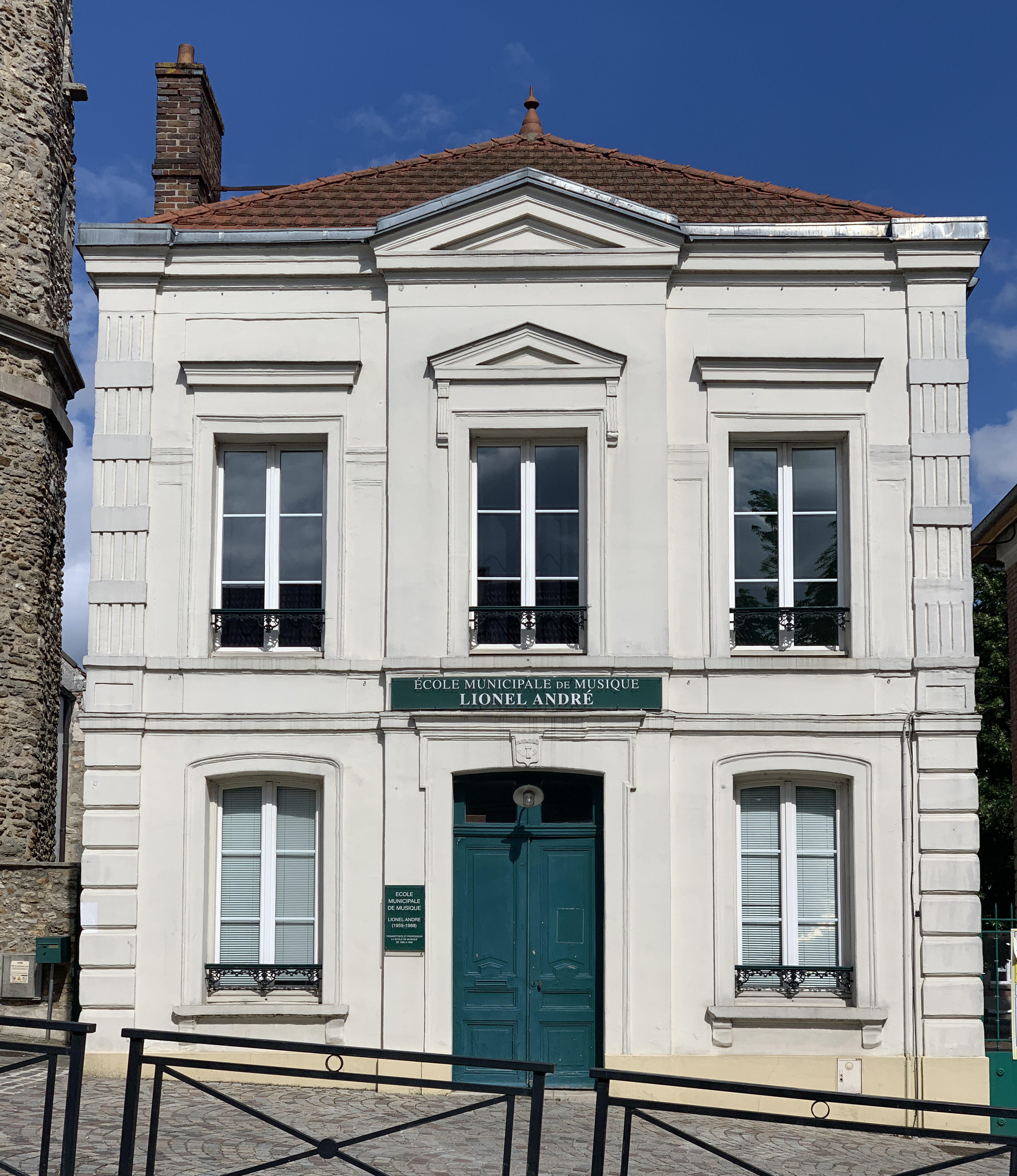 École municipale de musique Lionel André, La Queue-en-Brie.